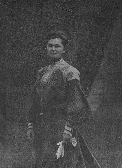 Софья Николаевна Глевбова, ур. Трубецкая (1854—1936)